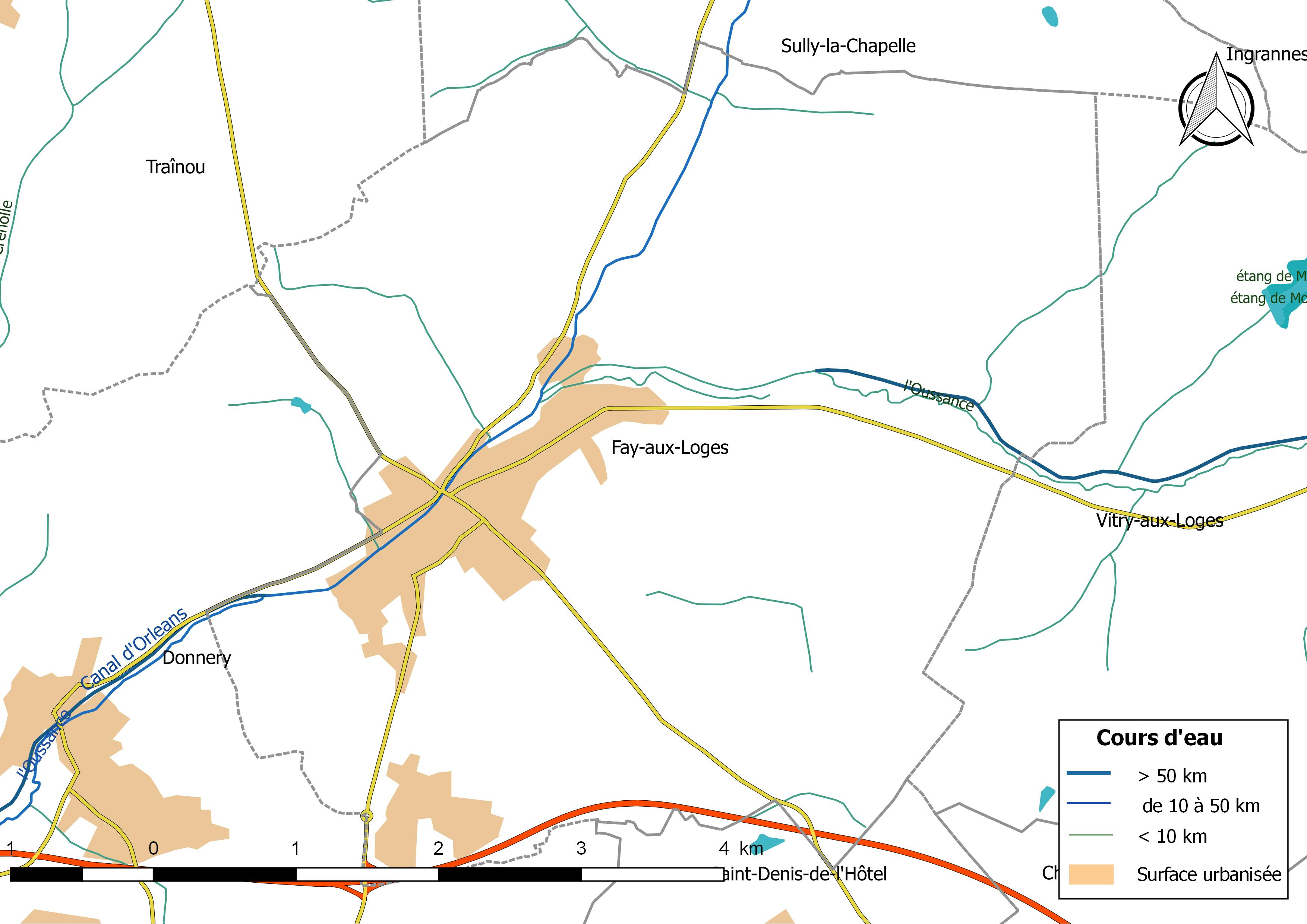 Carte du réseau hydrographique de la commune de Fay-aux-Loges (France).